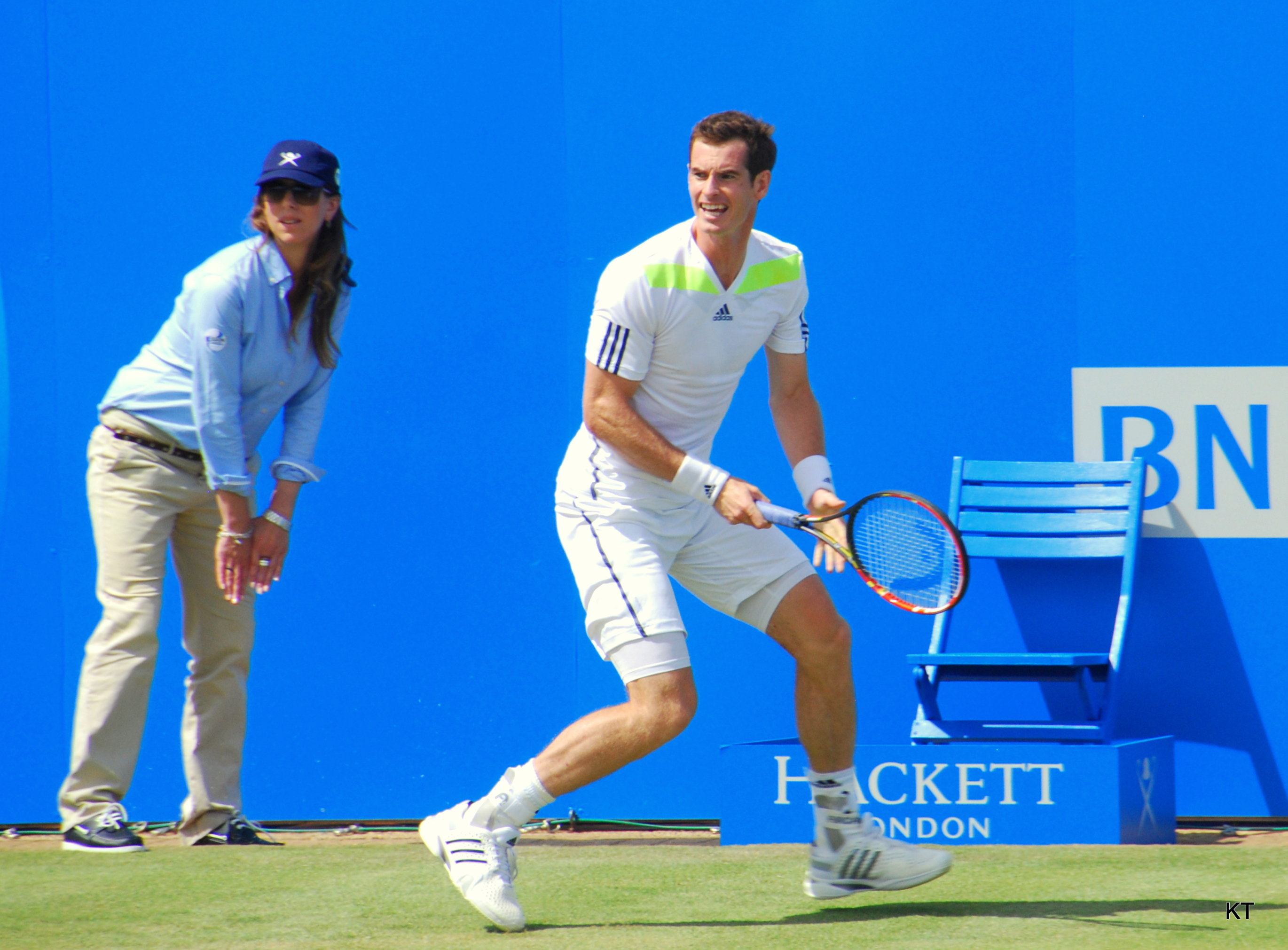 Andy Murray